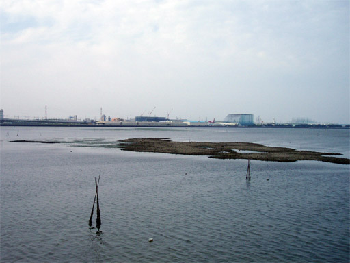 三番瀬、猫実川河口付近にあるカキ礁の遠景。2005年5月撮影。